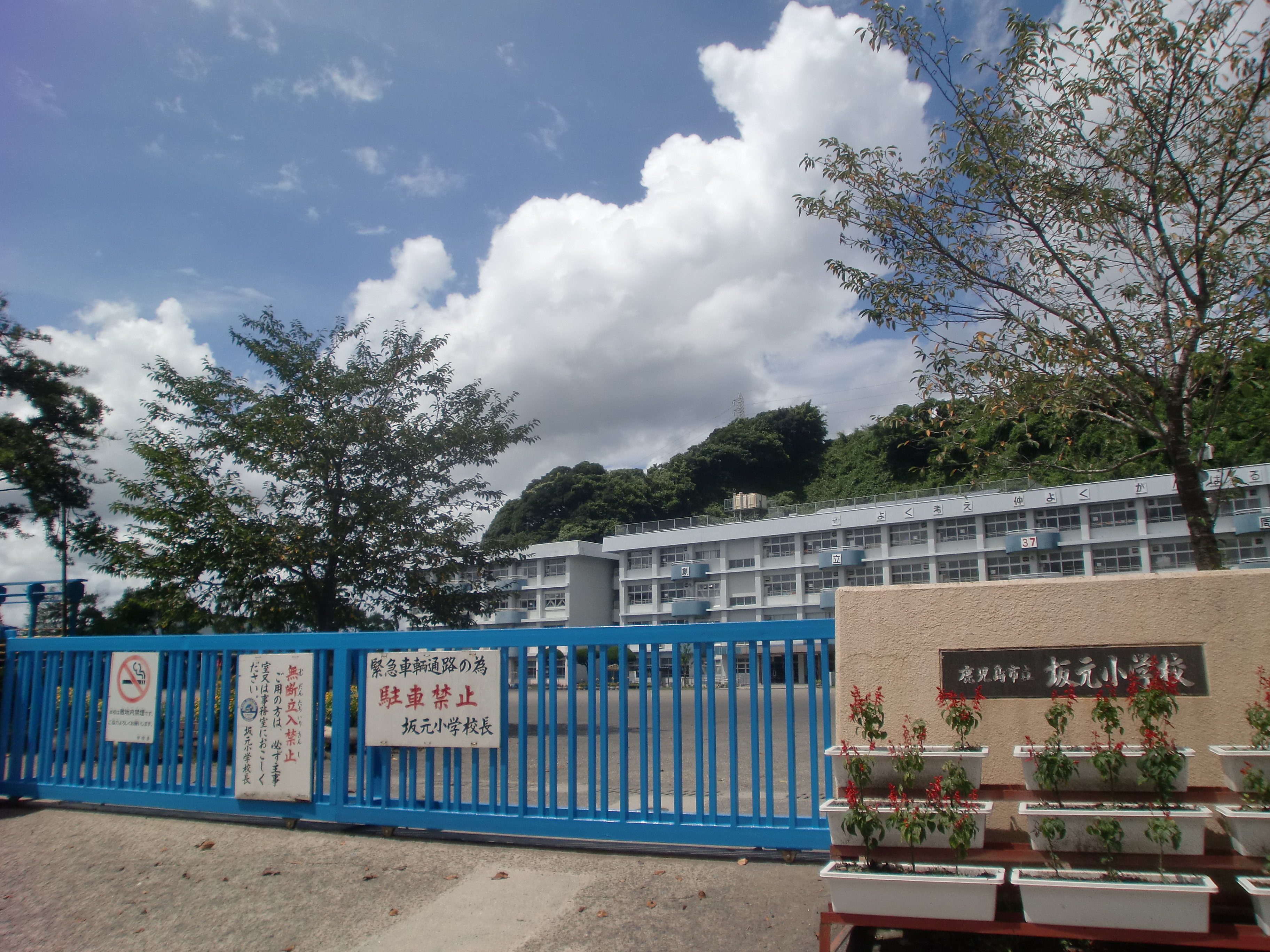 鹿児島市立坂元小学校の外観。